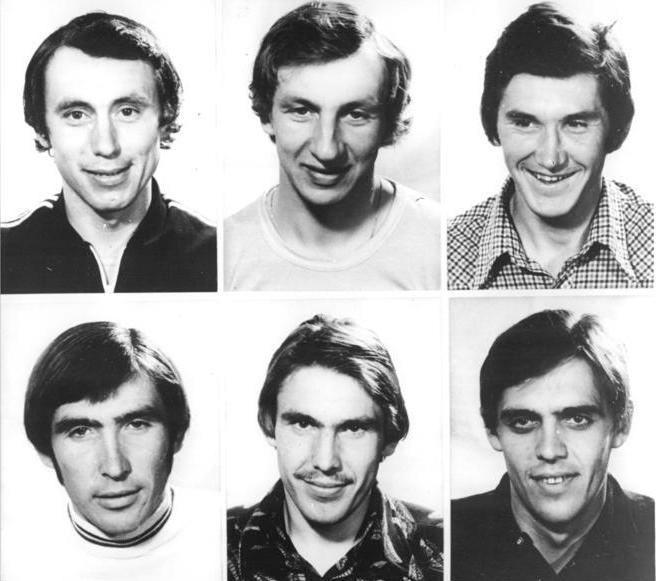 Radrennfahrer, UdSSR ADN-ZB Reiche 9.5.77-str Lodz: 30.Internationale Friedensfahrt - 2.Etappe von Warschau nach Lodz über 133 km. Tableau der UdSSR-Mannschaft. Obere Reihe v.l.: Alexander Awerin (Sieger der 2.Etappe). Untere Reihe v.l.: Valerie Tschaplygin,Aavo Pikkuus (Sieger der 1.Etappe, Zweiter der 2.Etappe) , Juri Zajao.